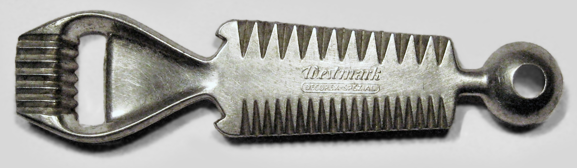 Mehrzweckgarnierer „Decorex-Spezial“ (Vorderseite), Fabrikat: Westmark, Material: Aluminium (nicht spülmaschinengeeignet), Abmessungen: 150 x 38 x 20 mm.Zum Formen von Streifen, Würfeln, Kugeln aus Butter, Käse und Früchten etc., sowie für dekorative Butterröllchen. Mit Kapselheber und Dorn (auf der Rückseite) zum Dosenlochen. Hergestellt etwa Ende der 1950er / Anfang der 1960er Jahre.